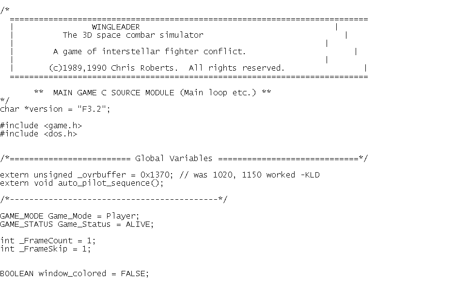 Wing Commander (Computerspiel) quelltext ausschnitt screenshot